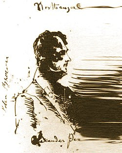 Брэнуэлл Бронте. Портрет Александра Перси